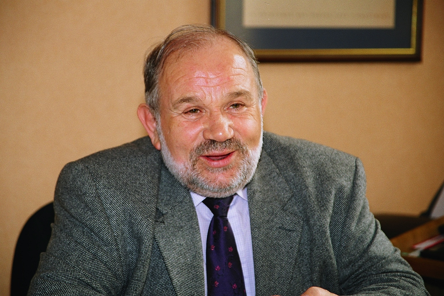 Marcel Charmant, président du Conseil Général de la Nièvre, photo libre de droit publiable moyennant mention de la Ville de Nevers